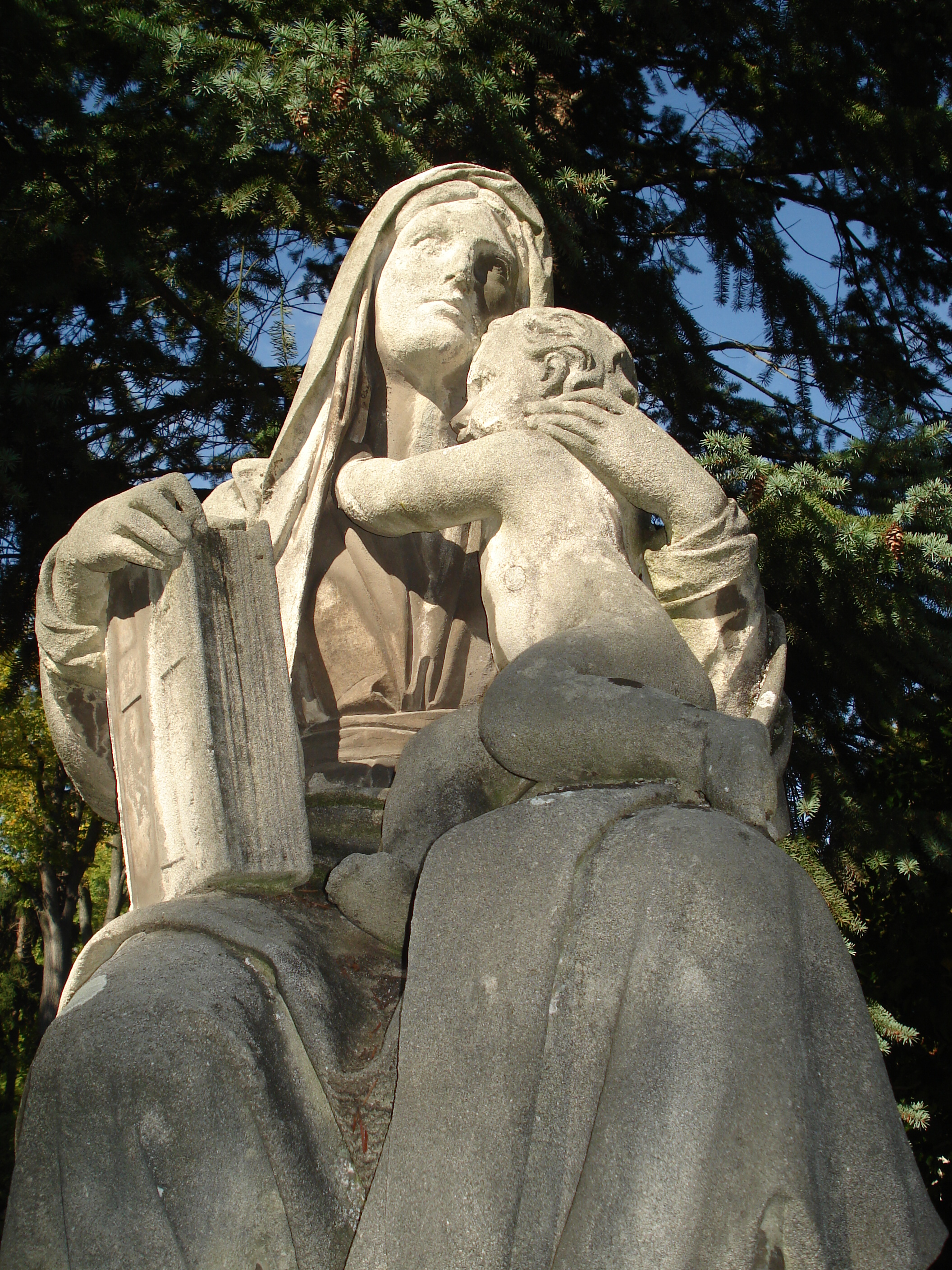 Grabstein Franz Schwarz deutscher Bildhauer